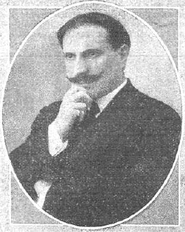 Fotografía del actor español Manrique Gil publicada en 1913 con motivo de su campaña teatral fuera de Madrid